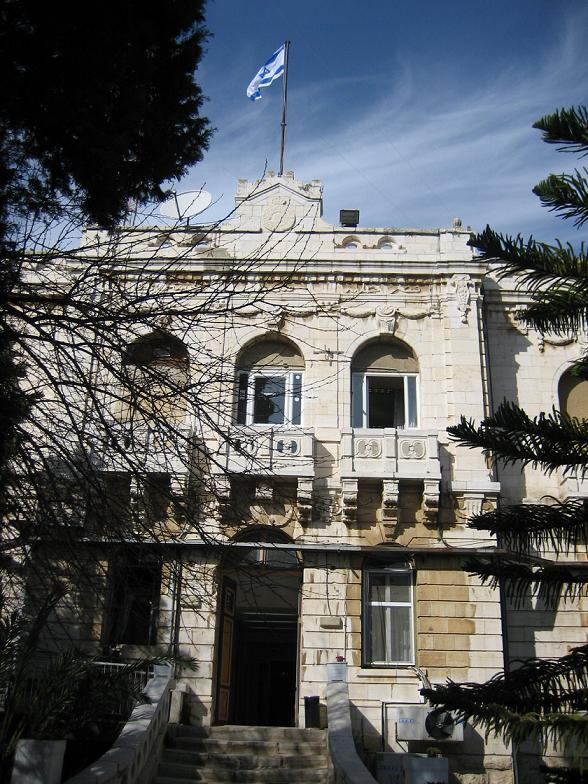 בניין קול ישראל ברחוב הלני המלכה, ירושלים. the israel broadcasting authority building, Jerusalem, Israel